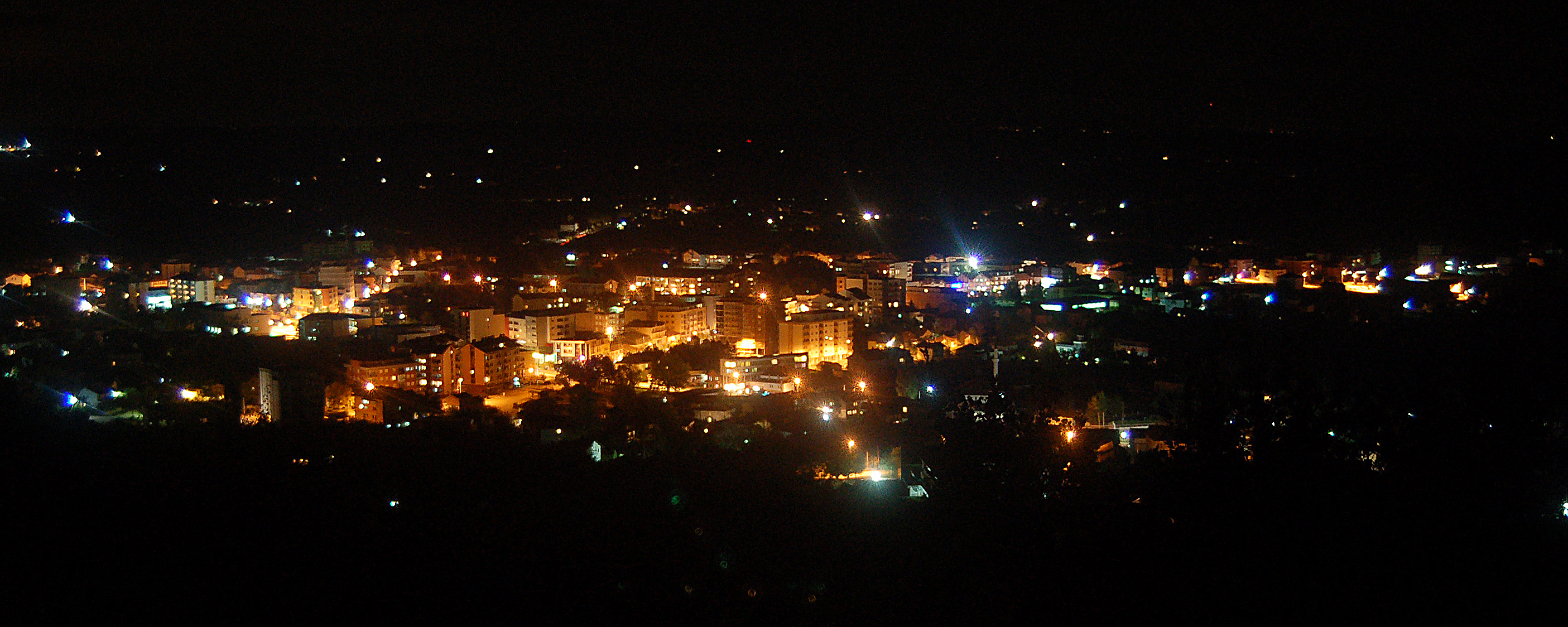 Istogu naten